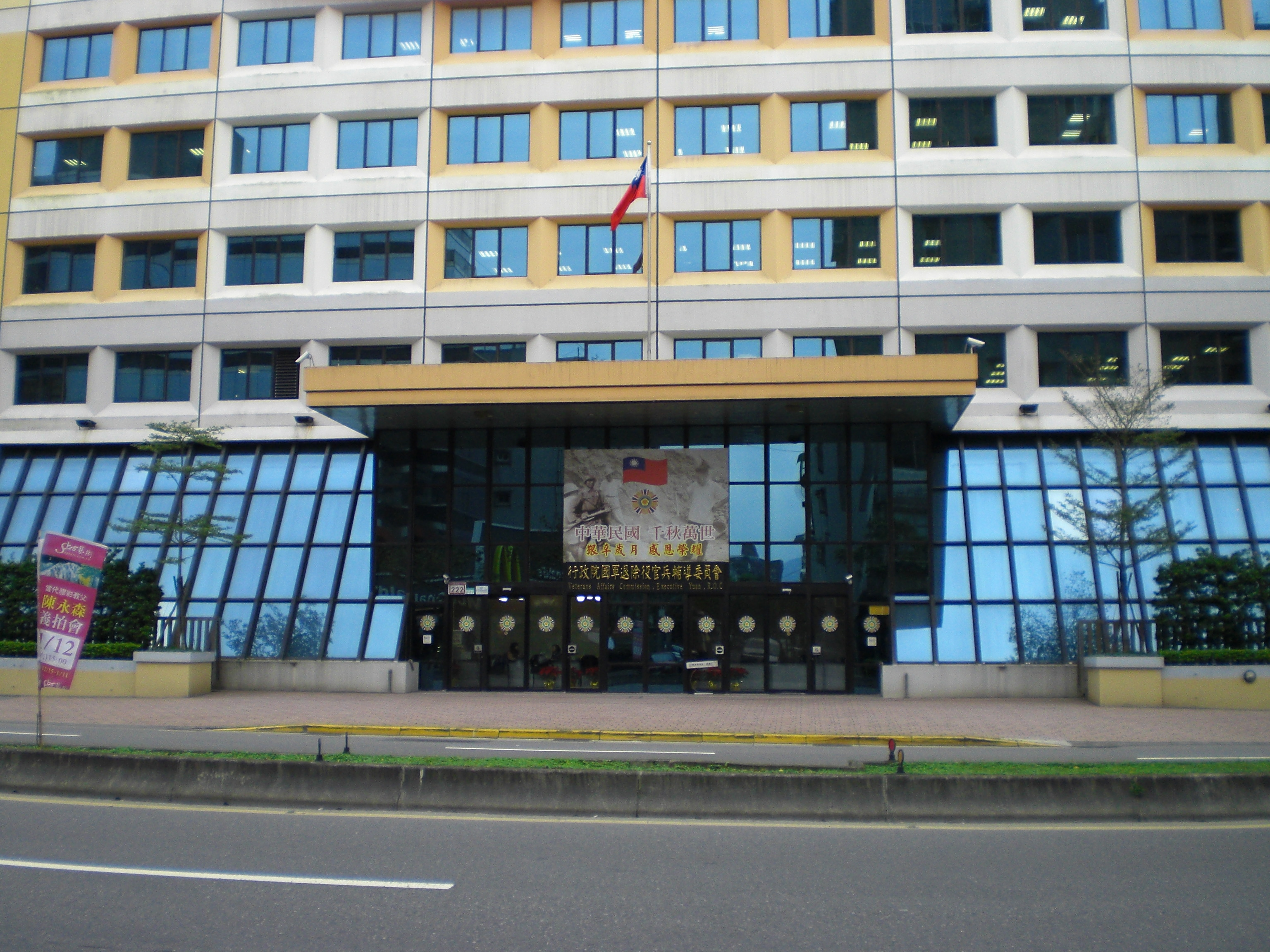 行政院國軍退除役官兵輔導委員會大樓大門。